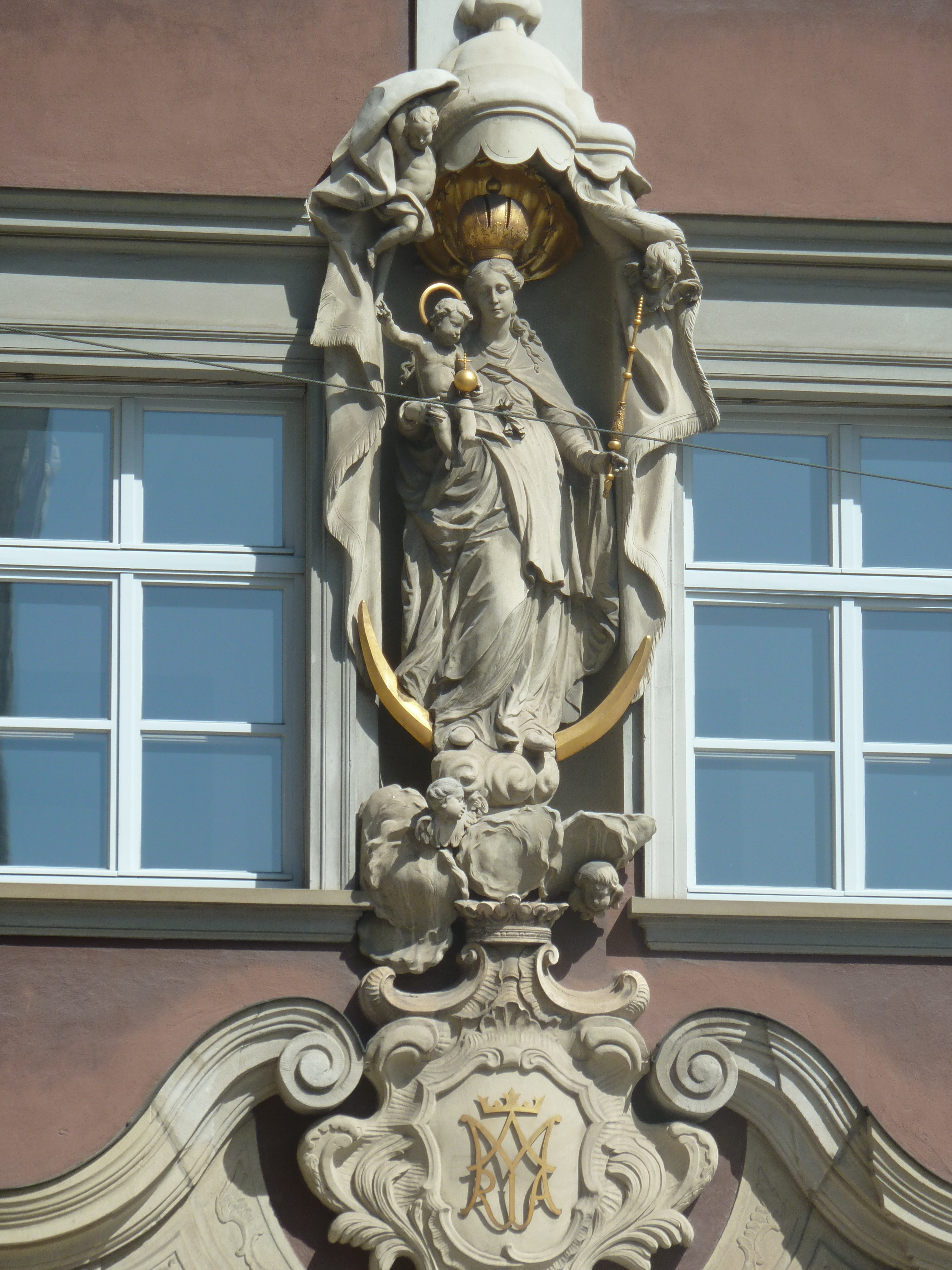 Hohenleitner Madonna am Domherrenhaus Hoher Weg 30, Augsburg